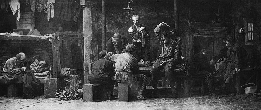 Uraufführung von Maxim Gorkis „Nachtasyl" 1902 in Moskau. Spielszene aus den 2. Akt.